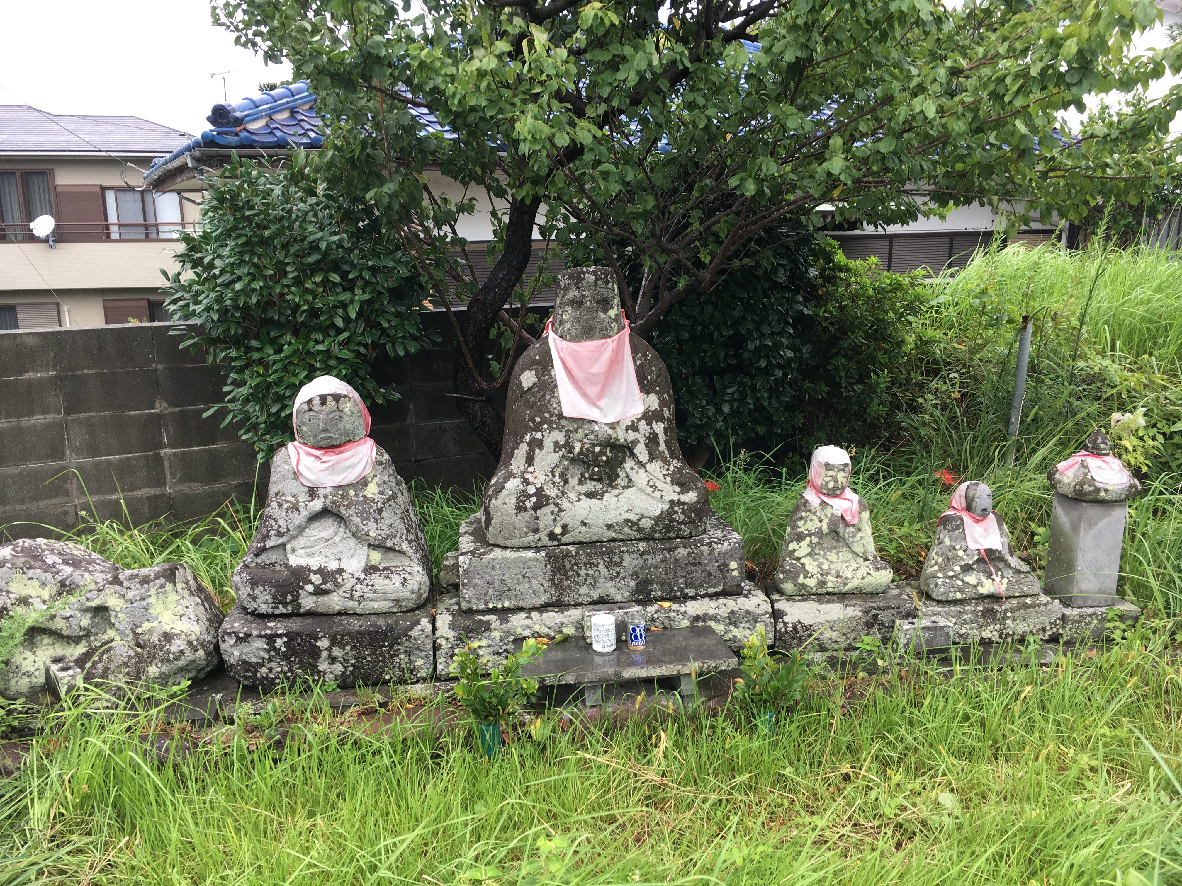 東の道祖神